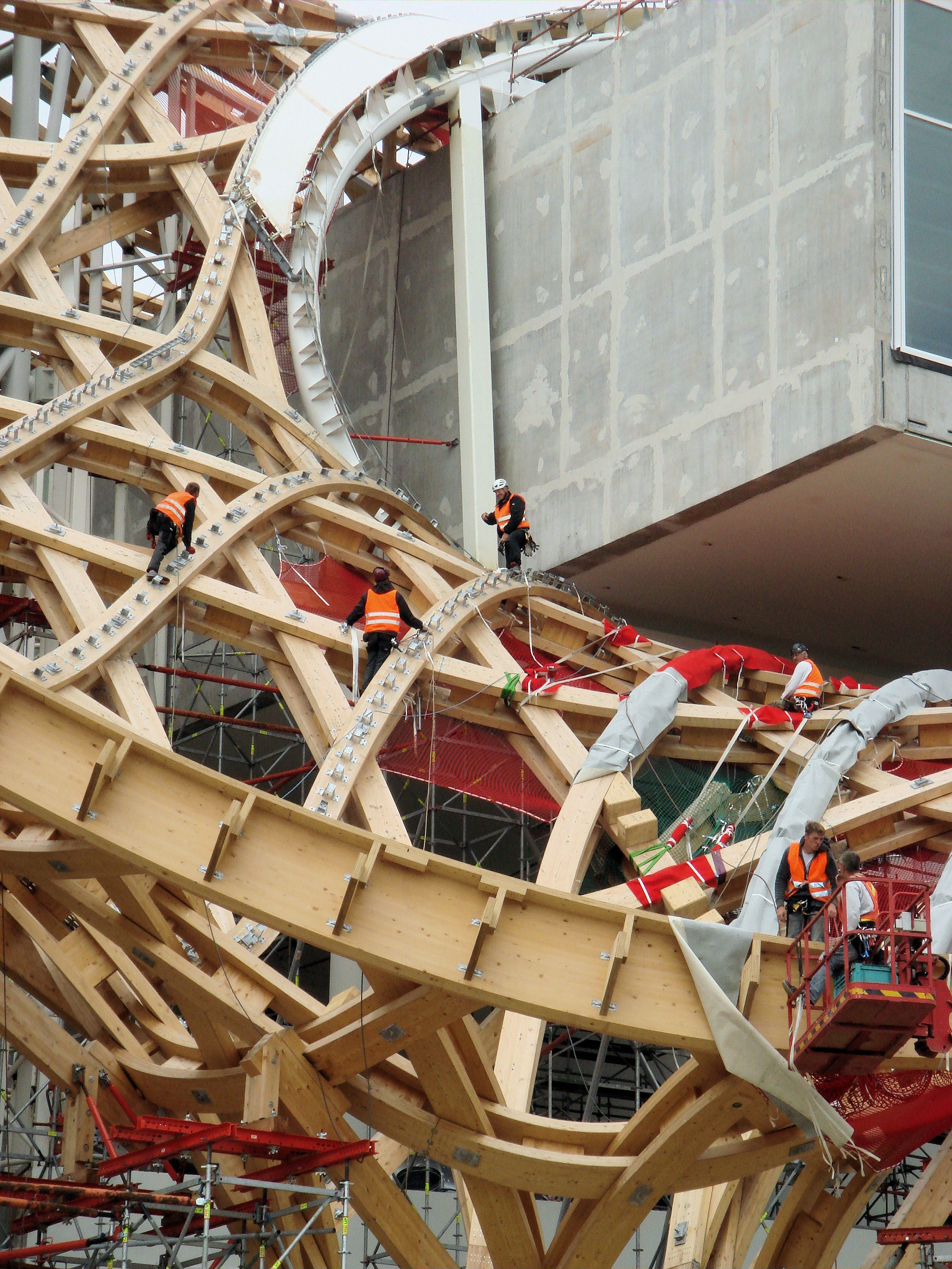 Centre Pompidou-Metz - Pose des pièces de la charpente en bois et des pièces de fixation de la toile